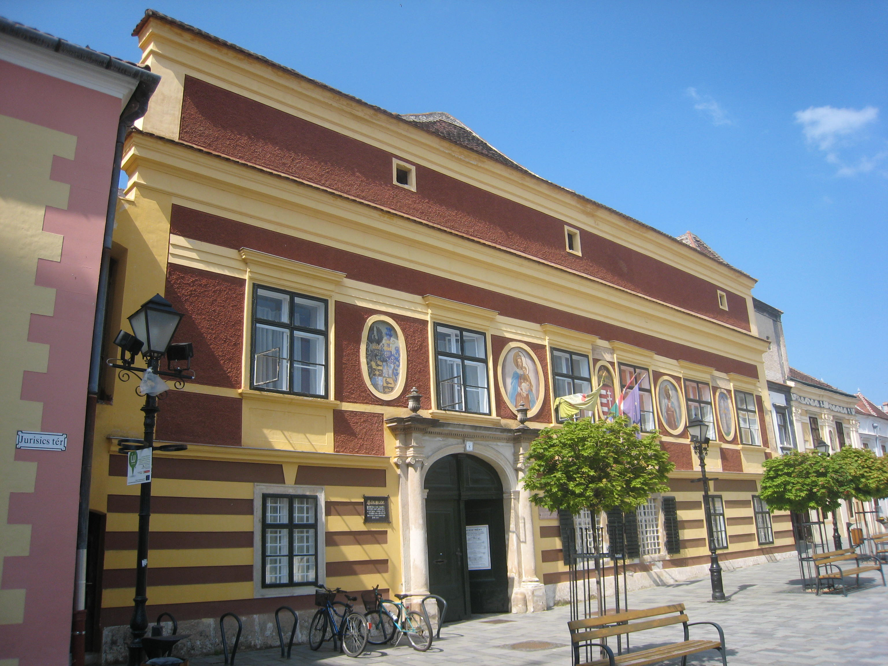 Kiseg, mestna hiša; v prvi luneti z leve je grb rodbine Jurišić.